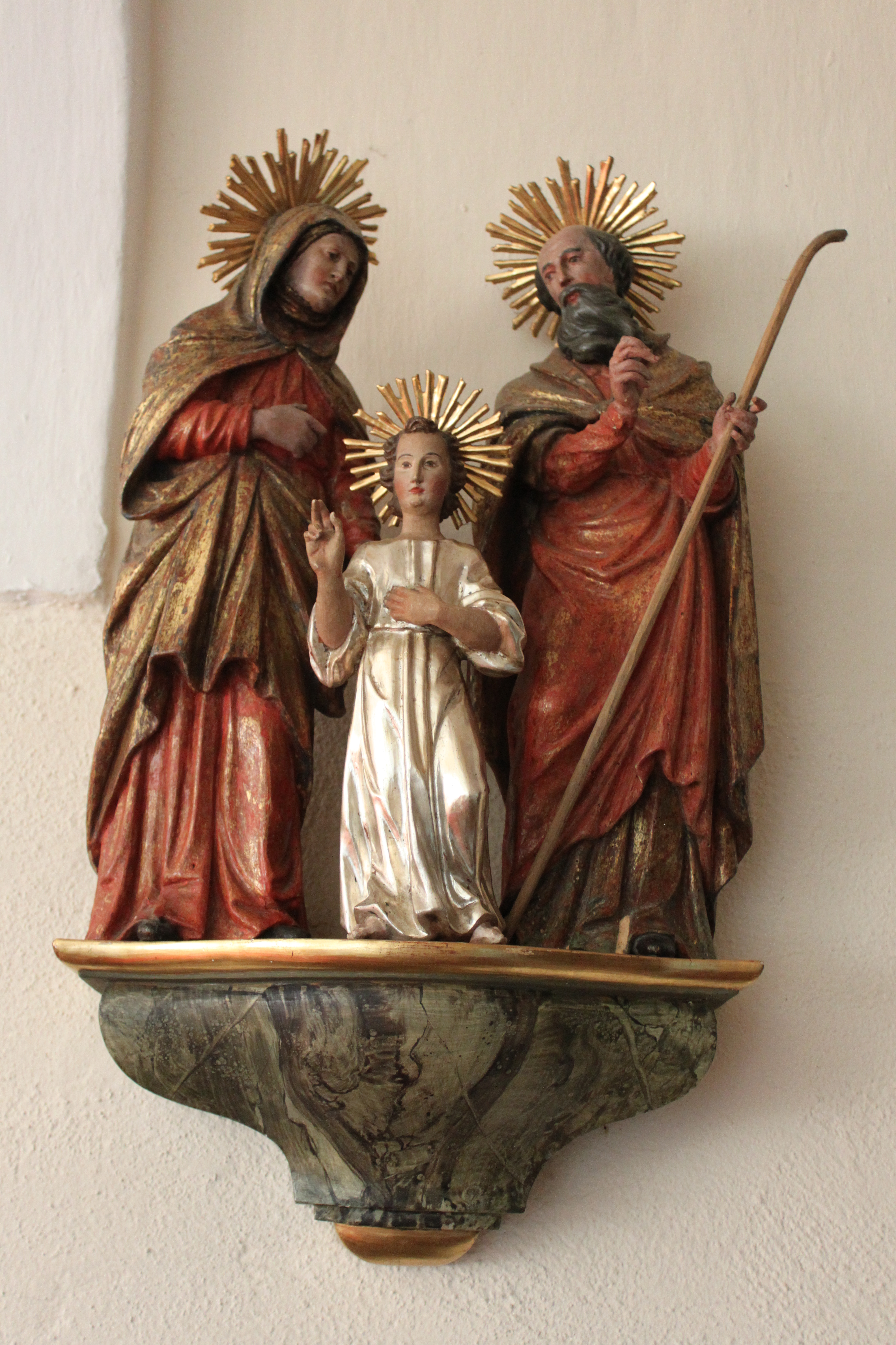 Wallfahrtskirche Mariä Heimsuchung, Heilige Familie